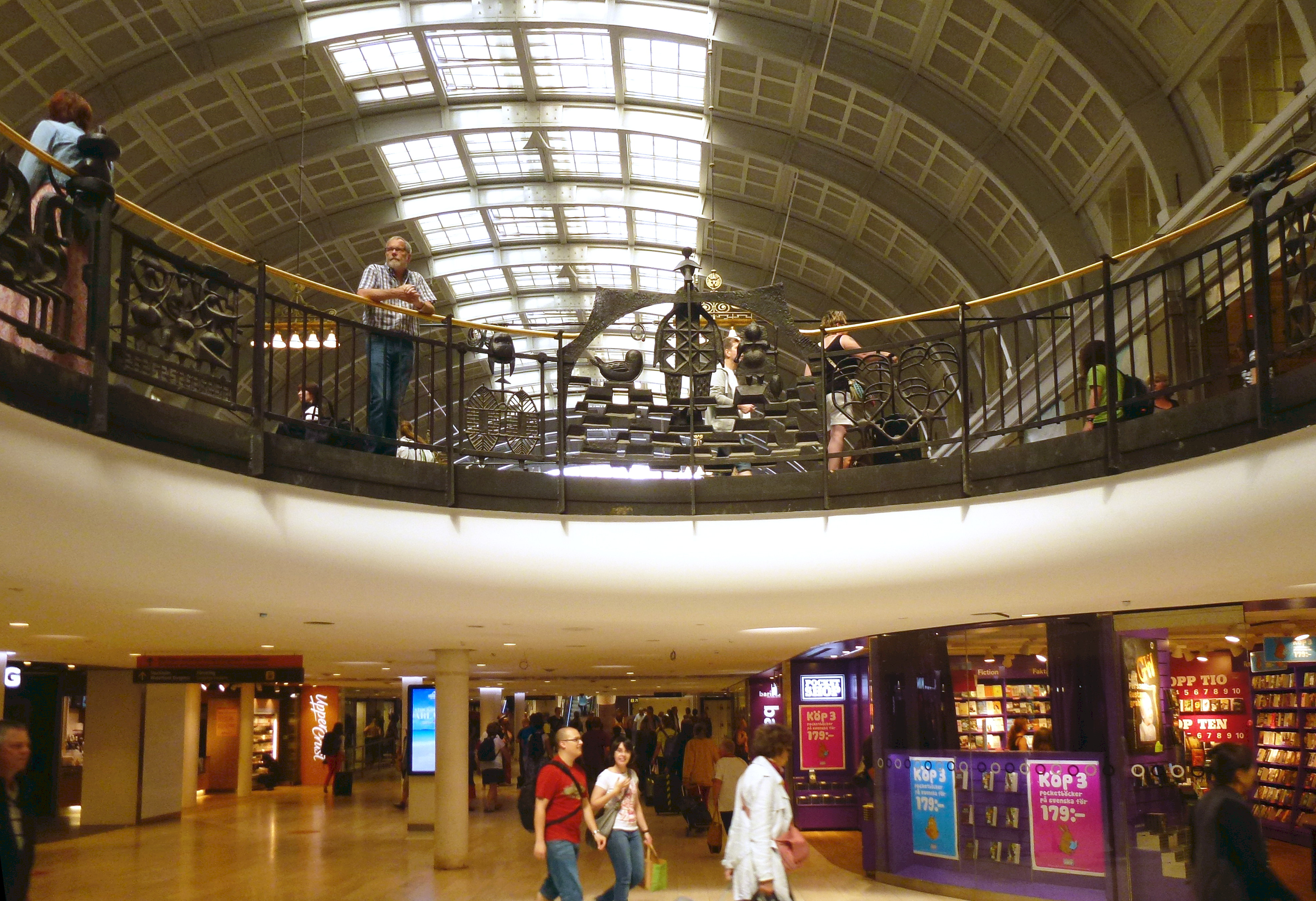 Ringen eller "Spottkoppen" i Stockholms Centralstation, räcket är skapat av skulptören Stig Blomberg